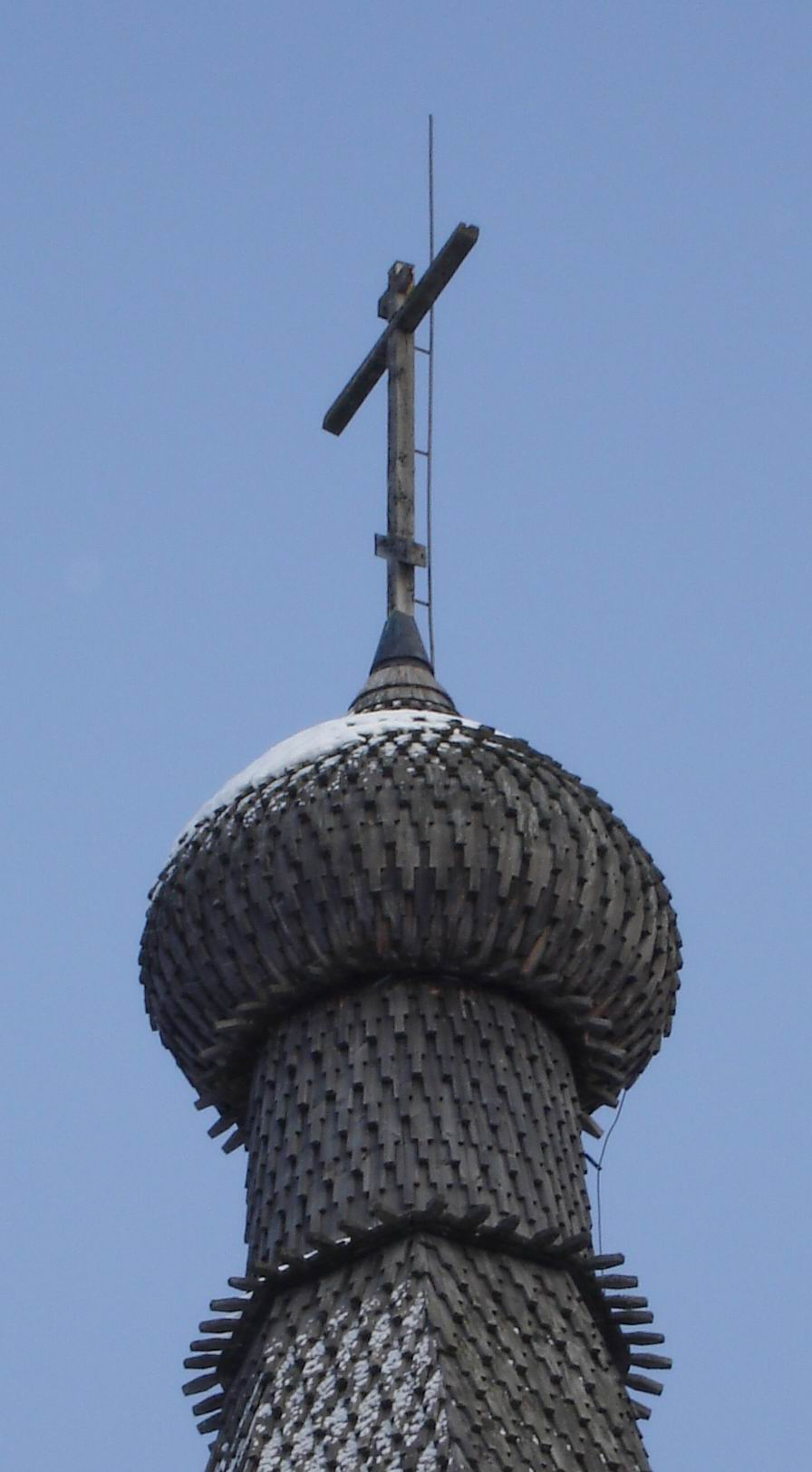 Громоотвод над церковным куполом (Малые Карелы)